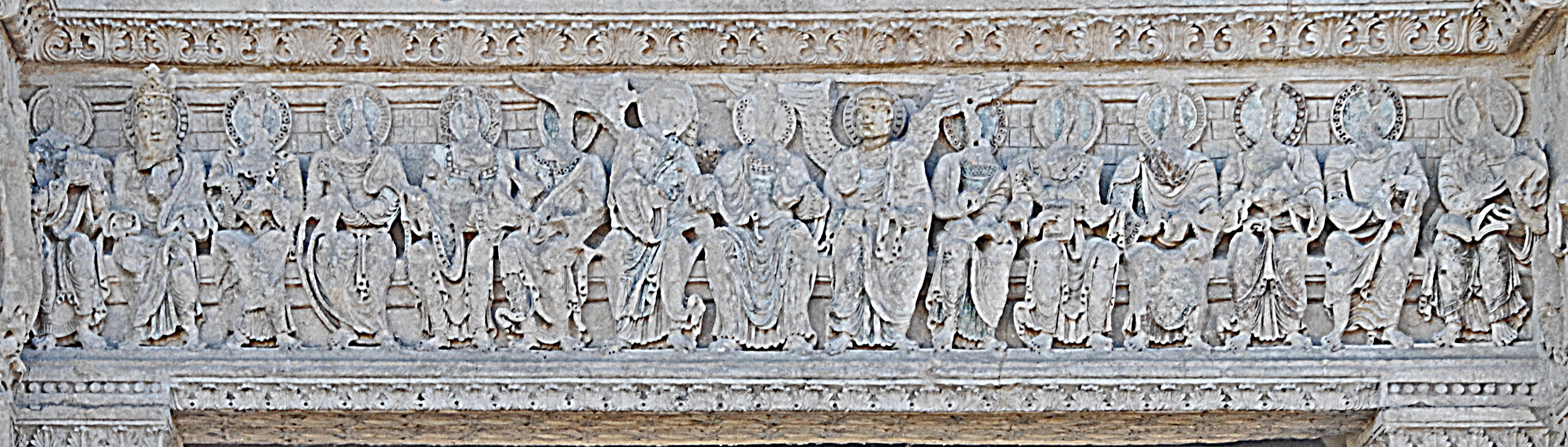 Großes Nordportal, Architrav